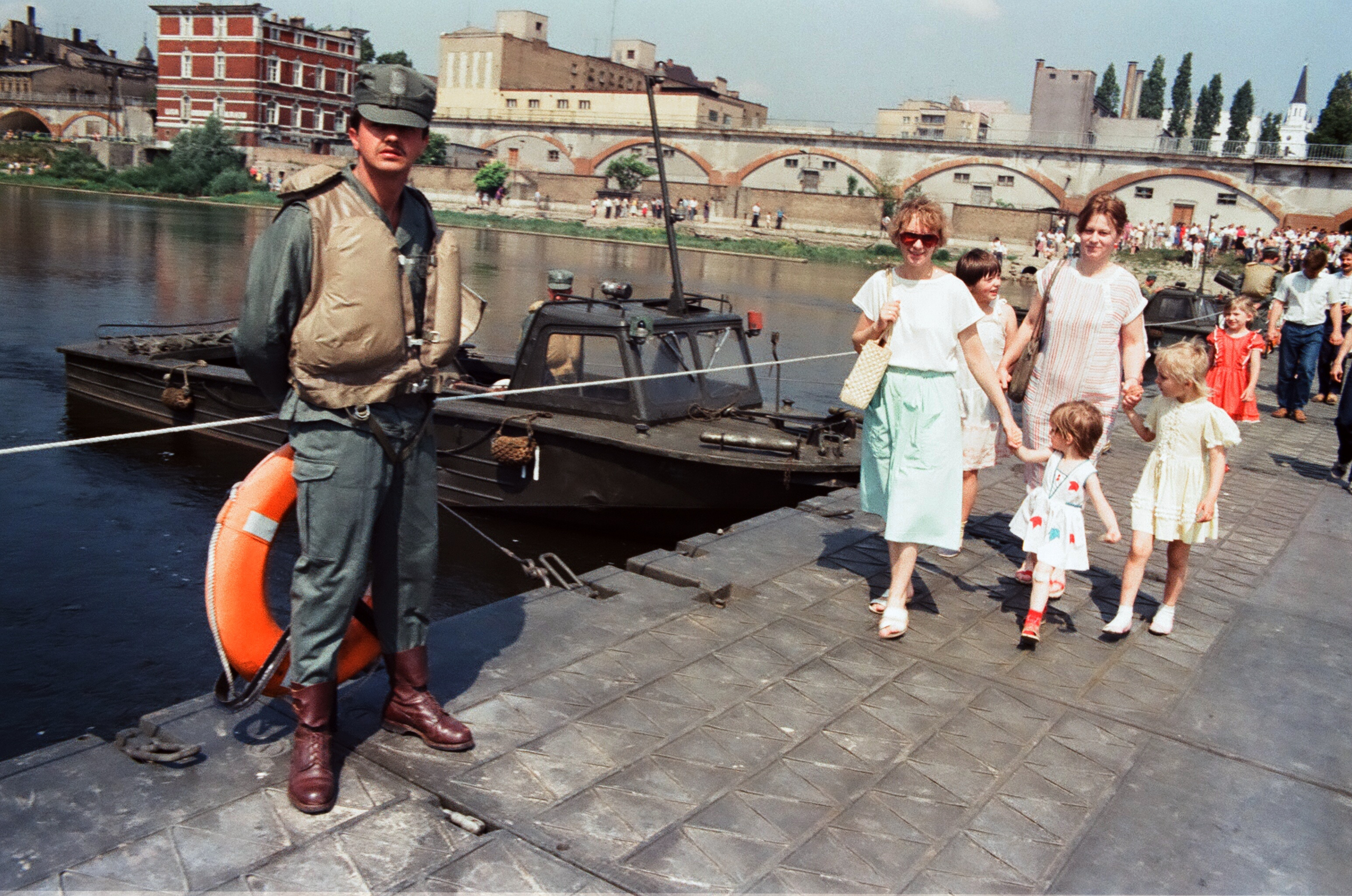 Gorzów Wlkp., most pontonowy PP-64 na Warcie, zbudowany przez 4 Łużycką Brygadę Saperów (4 BSap) – związek taktyczny wojsk inżynieryjno-saperskich Ludowego Wojska Polskiego. Przeprawa była jedną z atrakcji "Dni Gorzowa" w 1988 r.